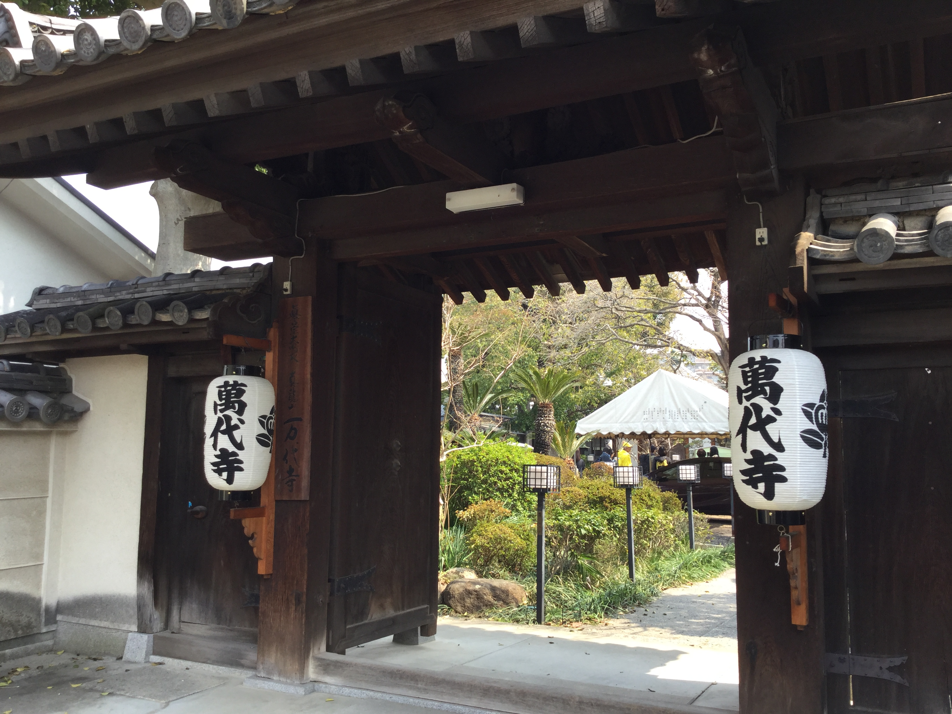 堺市にある万代寺の門